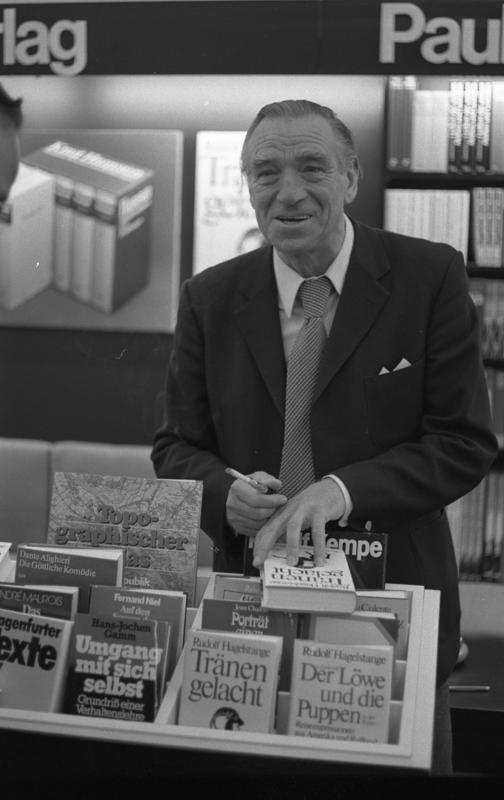 29. Frankfurter Buchmesse Ausstellungsstände (Rudolf Hagelstange)